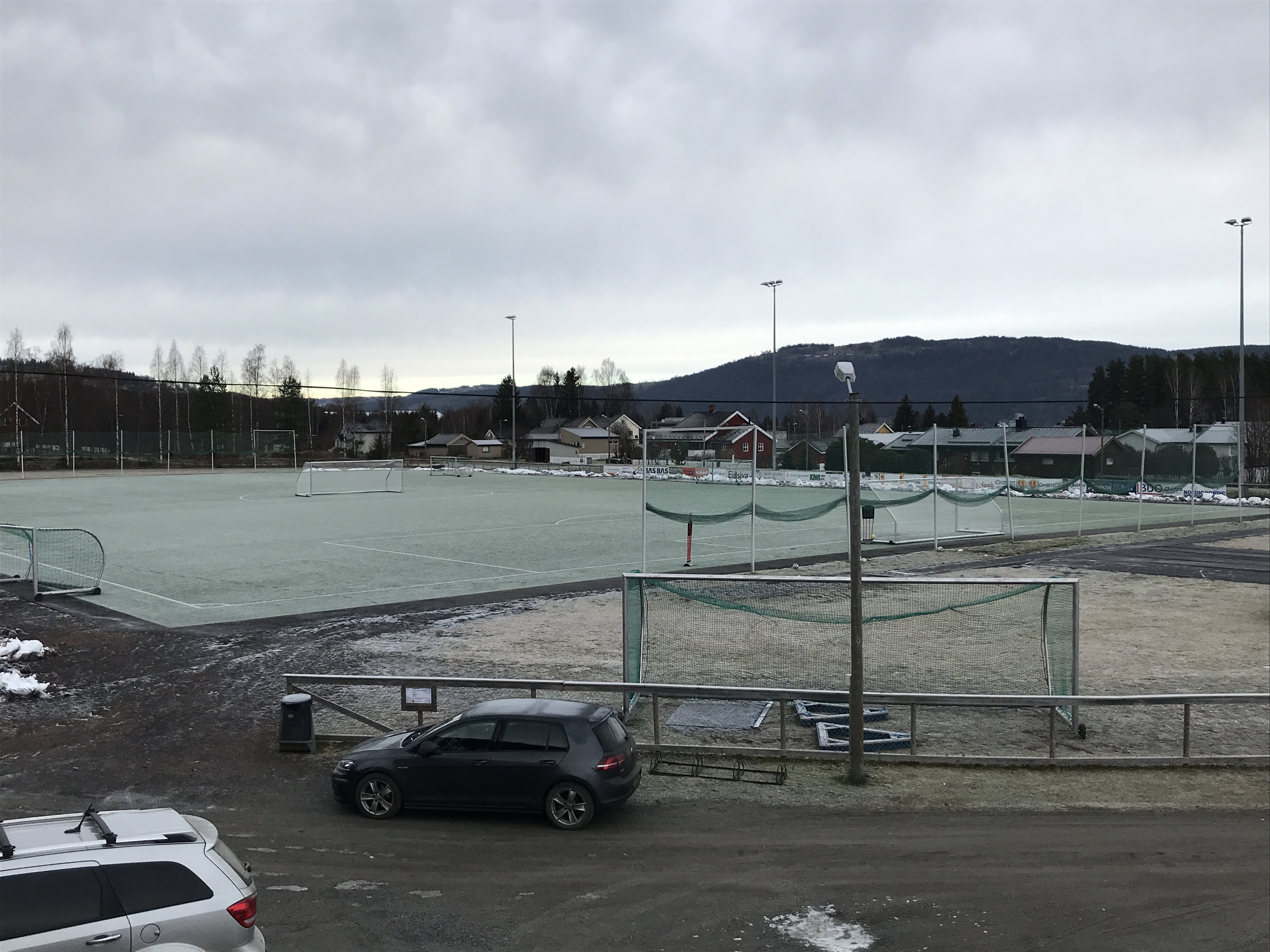 Biri idrettspark - kunstgressbanen.